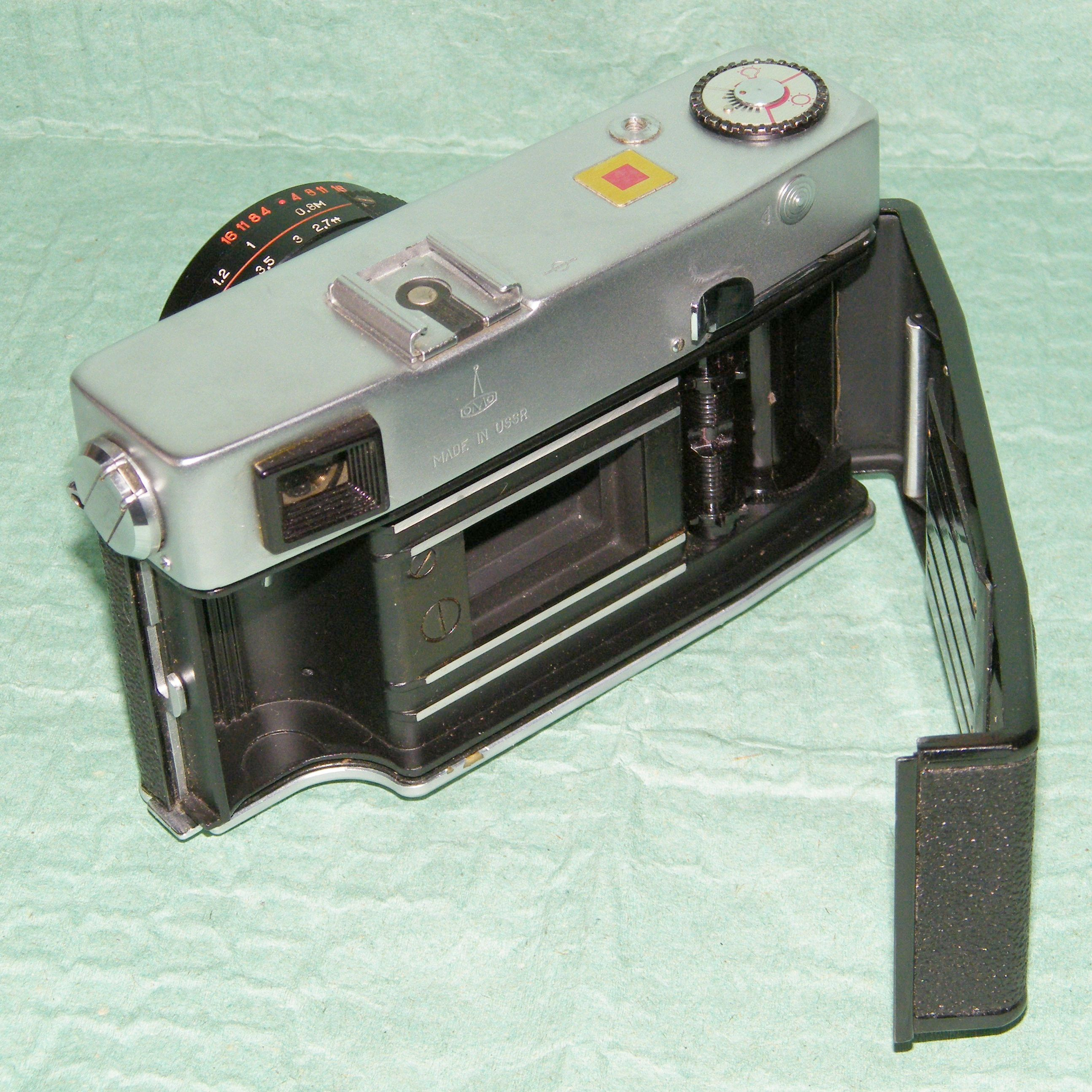 Фотоаппарат "Сокол-2" производства ЛОМО